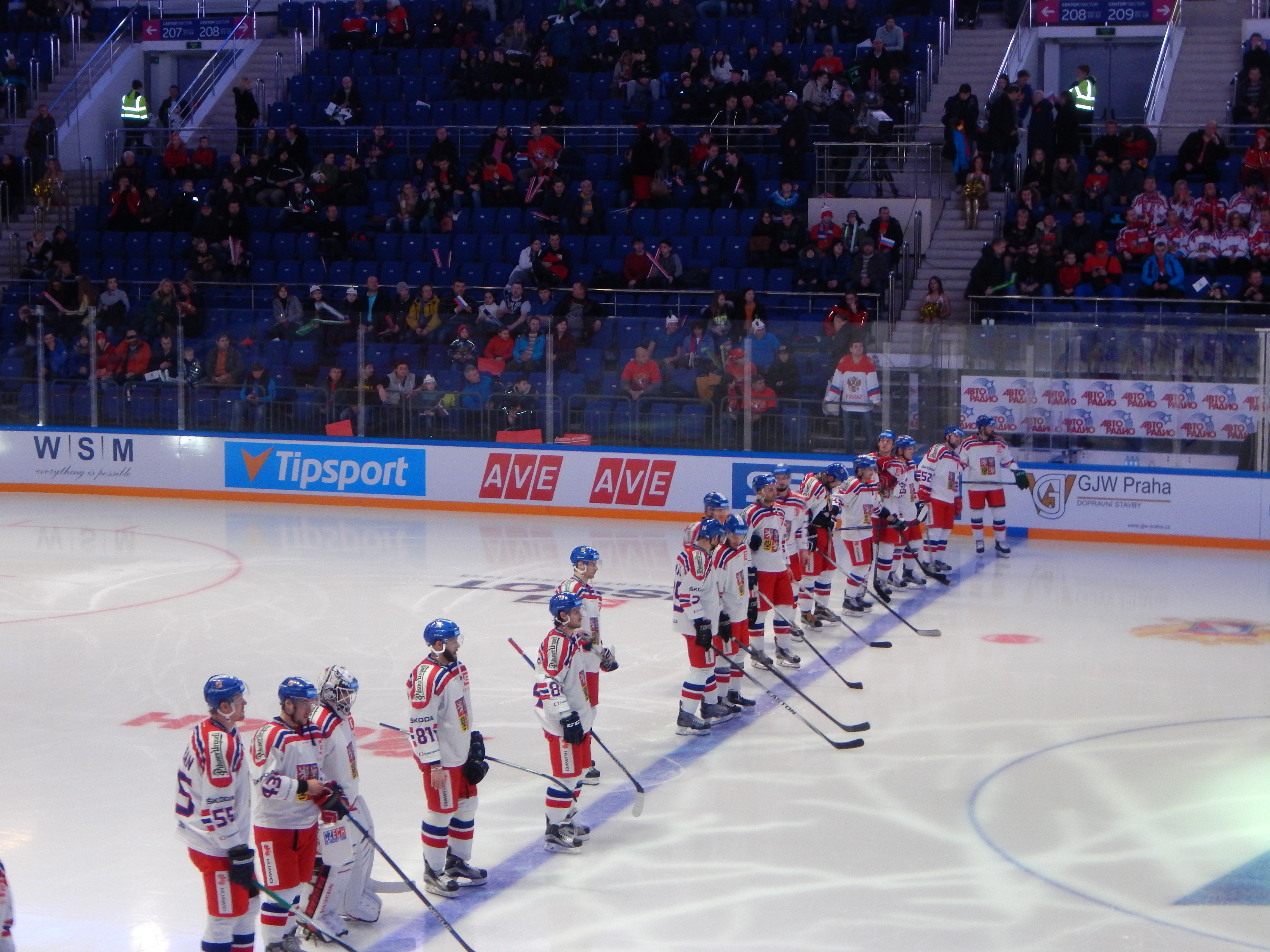 Сборная Чехии перед матчем со Швецией